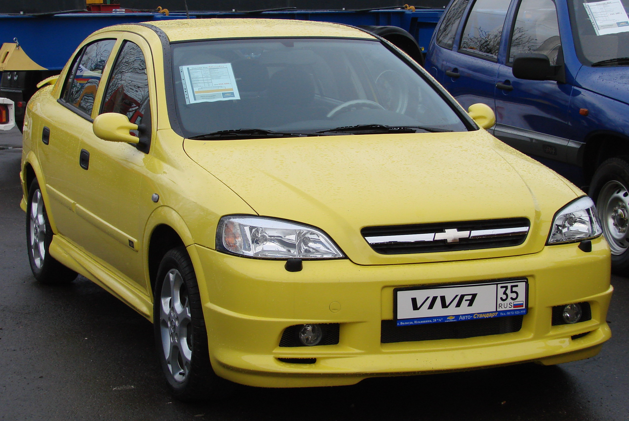 Шевроле ВИВА